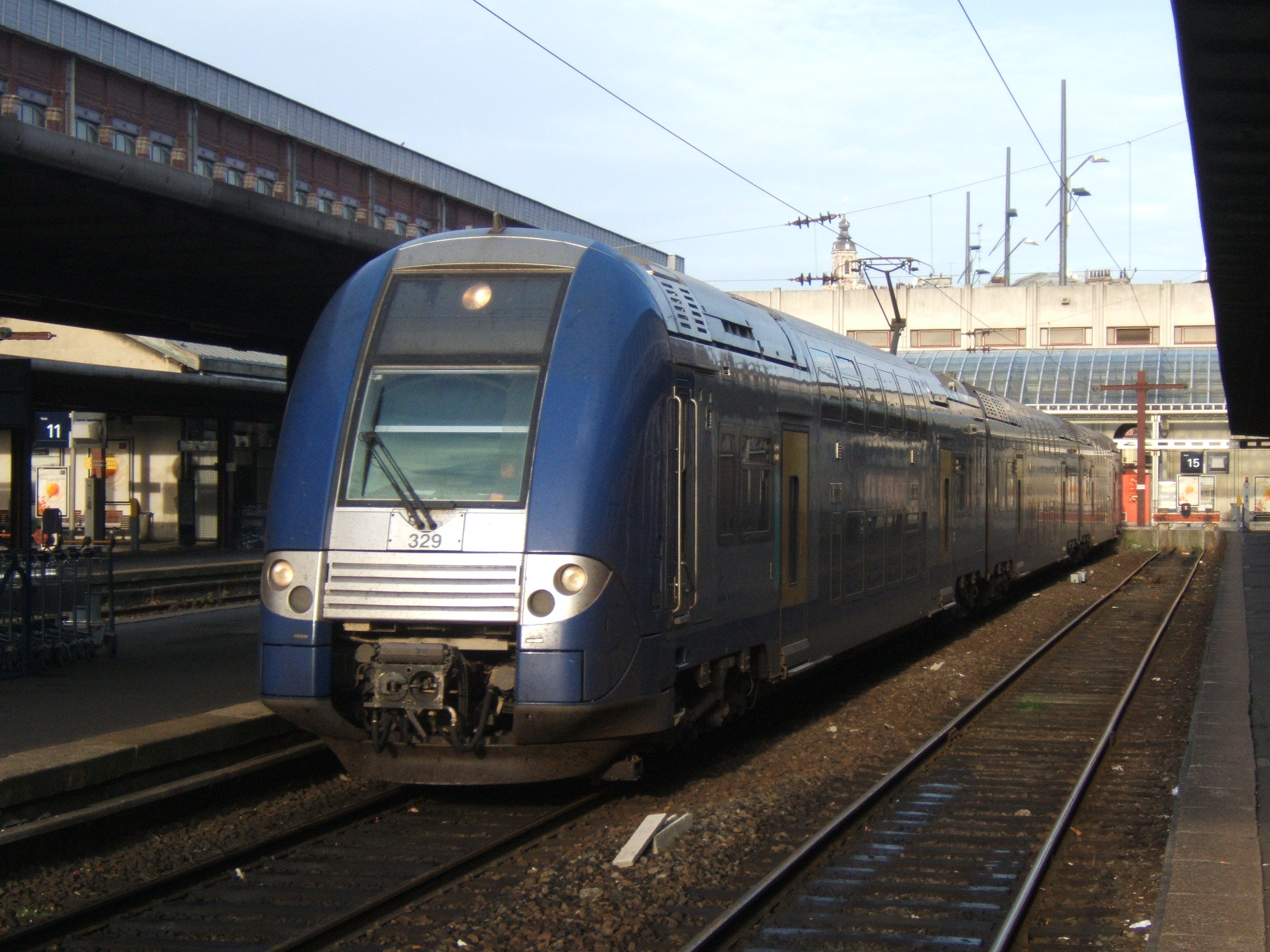 Elektrische dubbeldekker TER trein in Lille Flandres